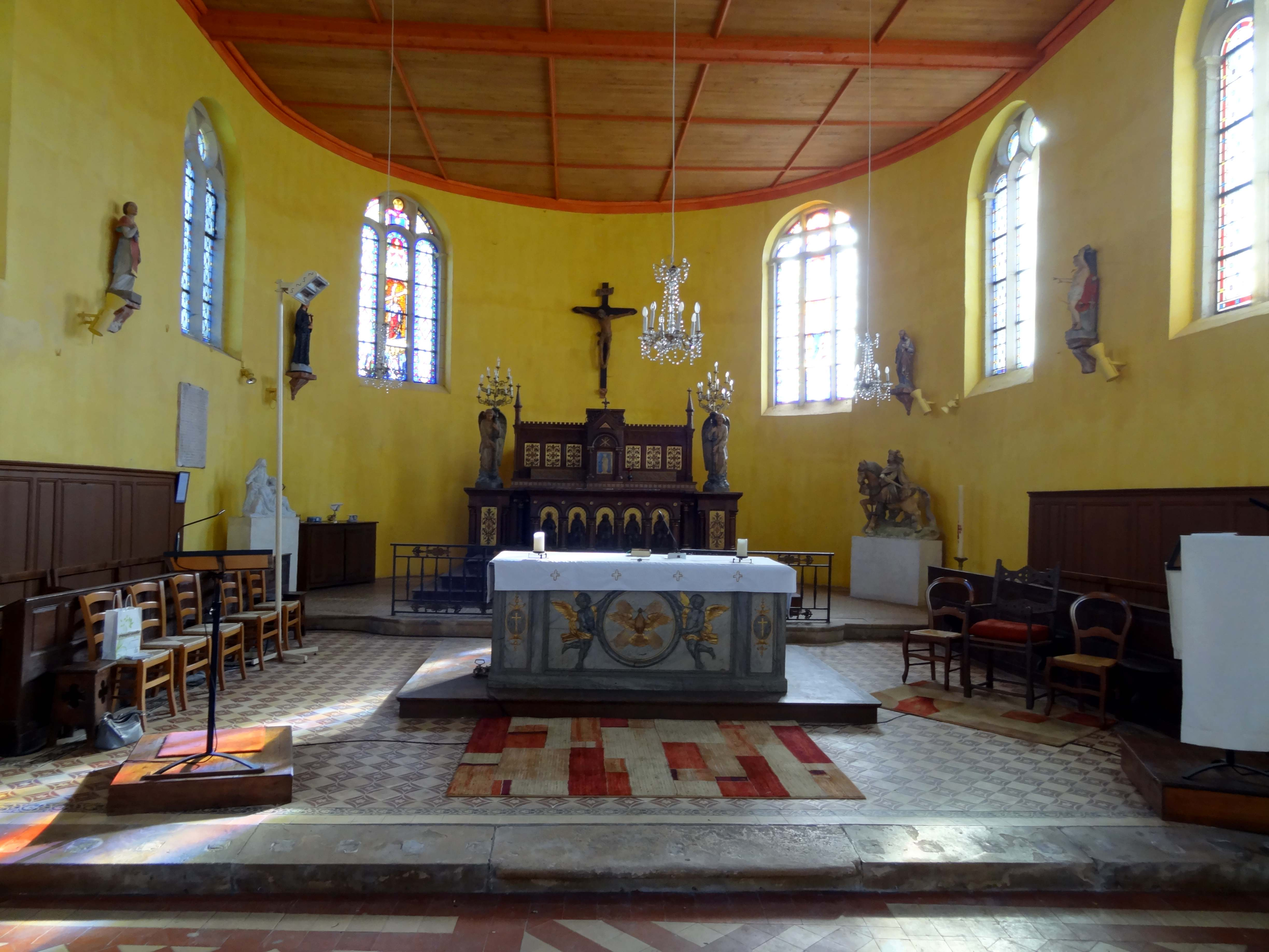 Intérieur de l'église - voir titre.